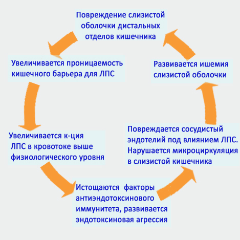 Схема. На схеме показано развитие повреждения слизистой оболочки кишечника. Последовательность патологических изменений приводит к развитию порочного круга, что, в свою очередь, определяет дальнейшее развитие повреждения слизистой оболочки и развитие эндотоксиновой агрессии.